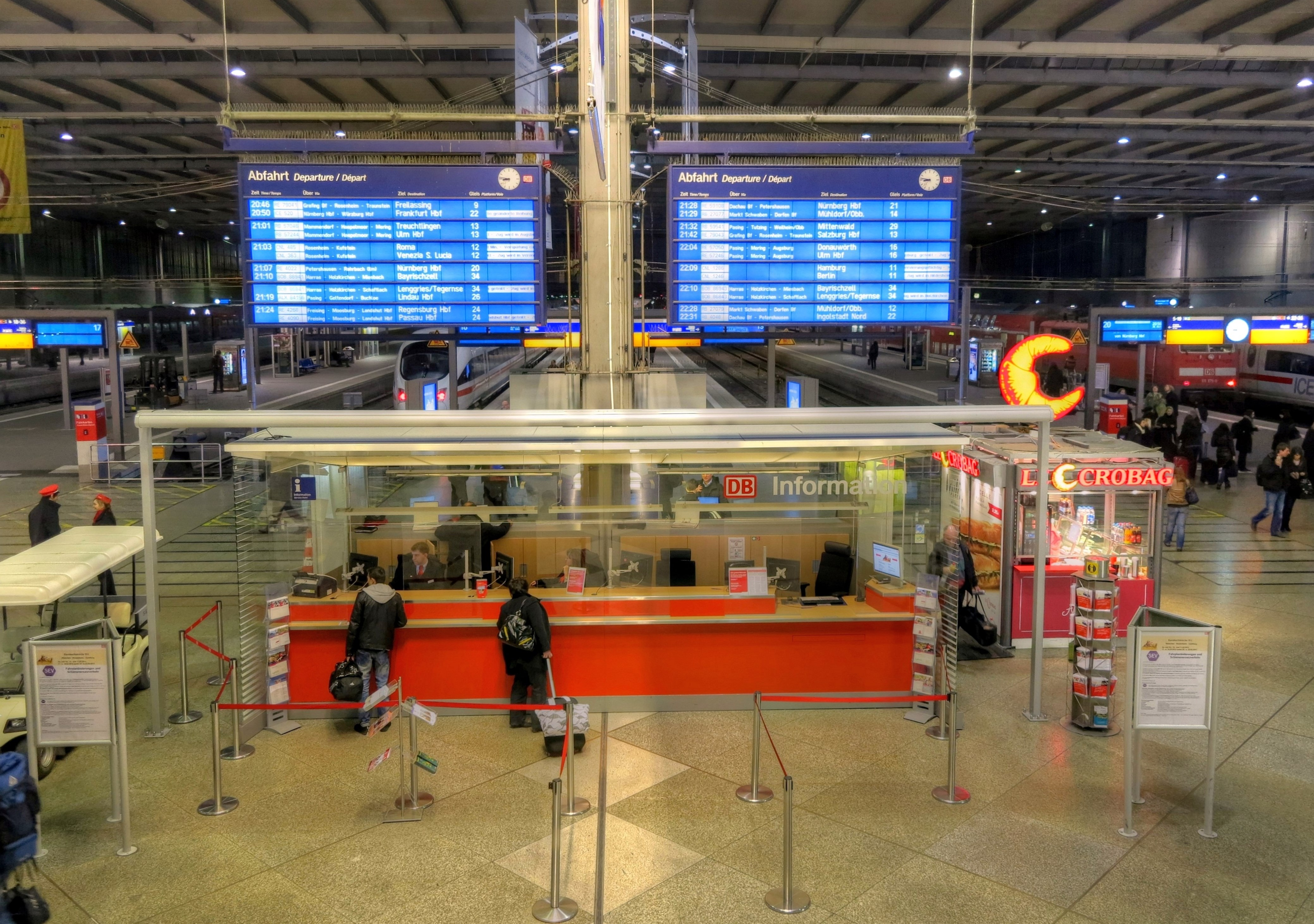 Deutschland, Bayern, München, Münchner Hauptbahnhof, Haupthalle, Deutsche Bahn Schalter DB Information, HDR-Bild